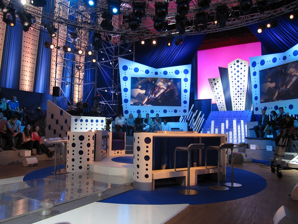 Vue générale du plateau de l'émission "On n'est pas Couché", Paris, France.